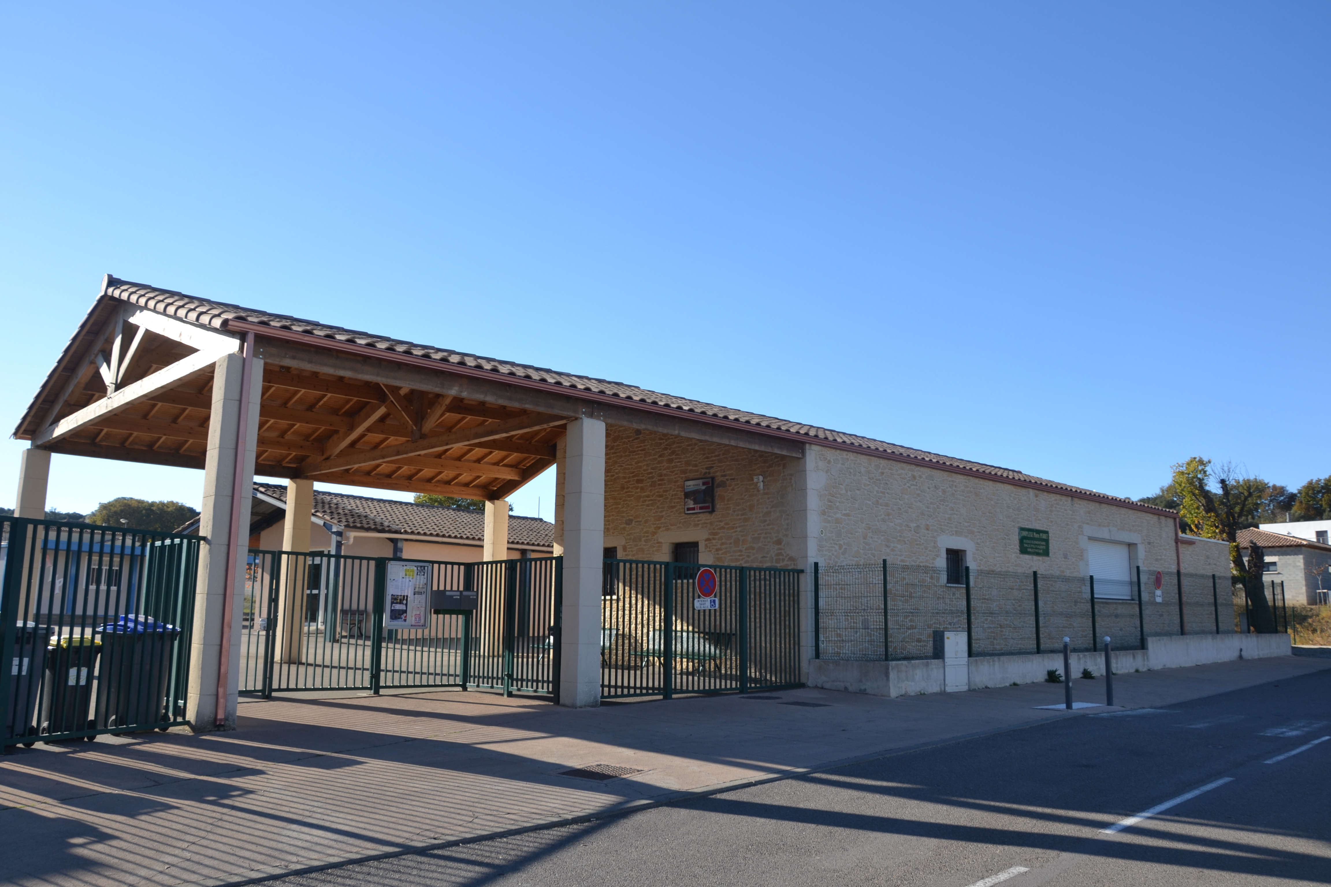 école à Saint-Sériès